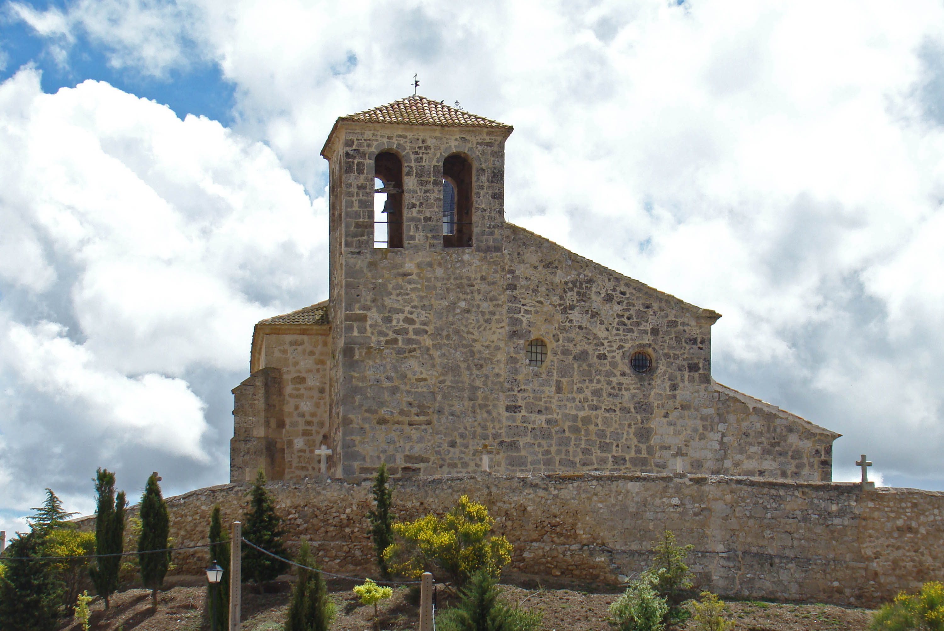 Iglesia de la Asunción en la localidad de Castrillo de Duero, provincia de Valladolid, España. Vista del edificio.